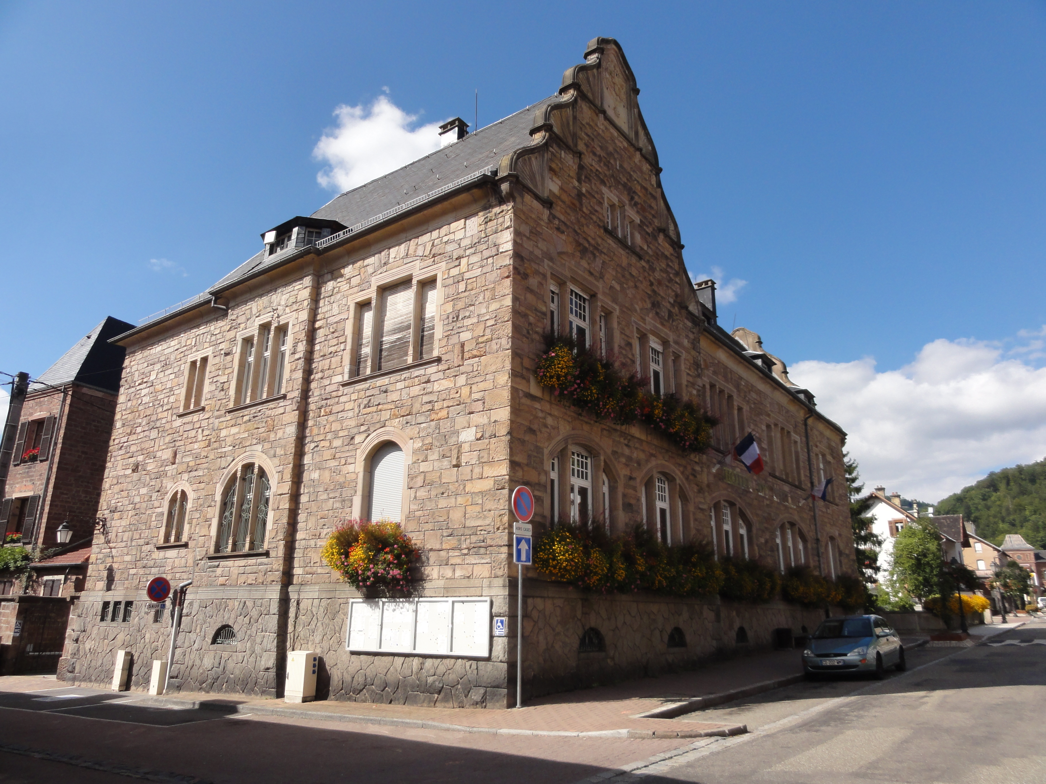 Alsace, Bas-Rhin, Schirmeck, Ancien tribunal (1905), aujourd'hui Hôtel de ville, 118 avenue de la Gare.